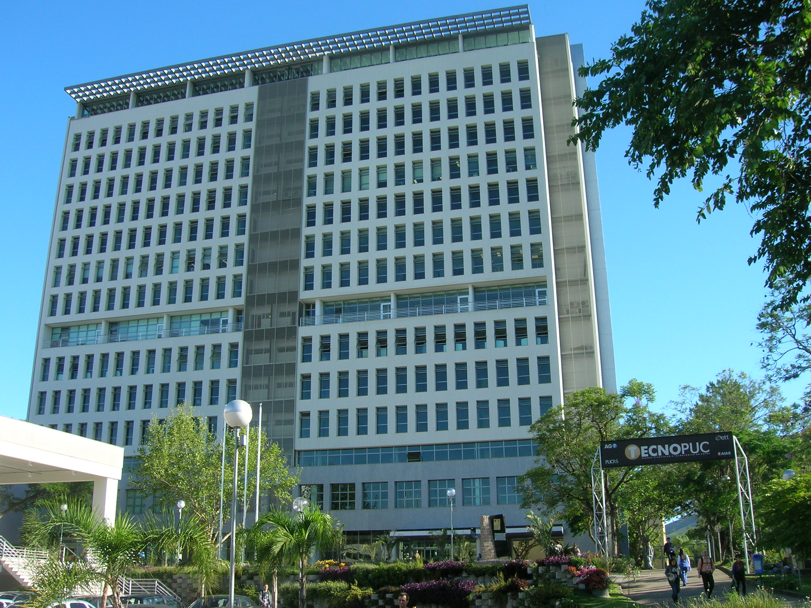 Prédio da Tecnopuc - o parque tecnológico da PUCRS.